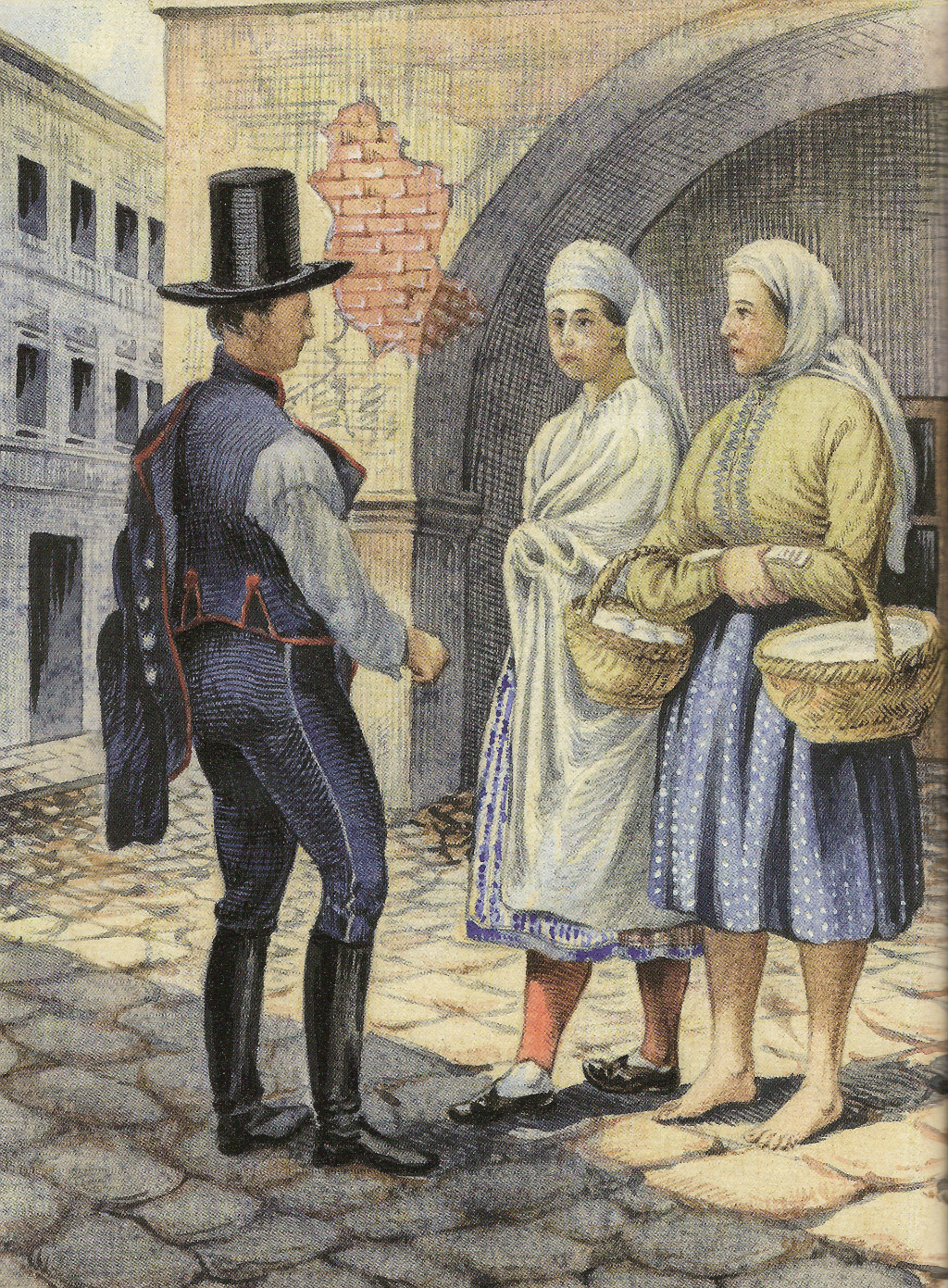 W Cieszynie